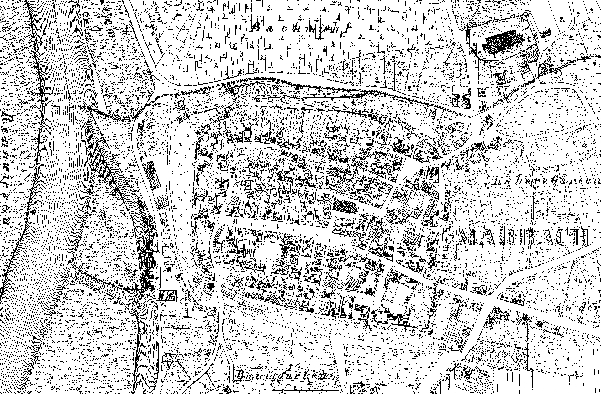 Stadtplan von Marbach aus der württembergischen Urflurkarte von 1832, Kartenblatt NO XLI-14 mit Nachbarblättern (Composit von Leo-BW)